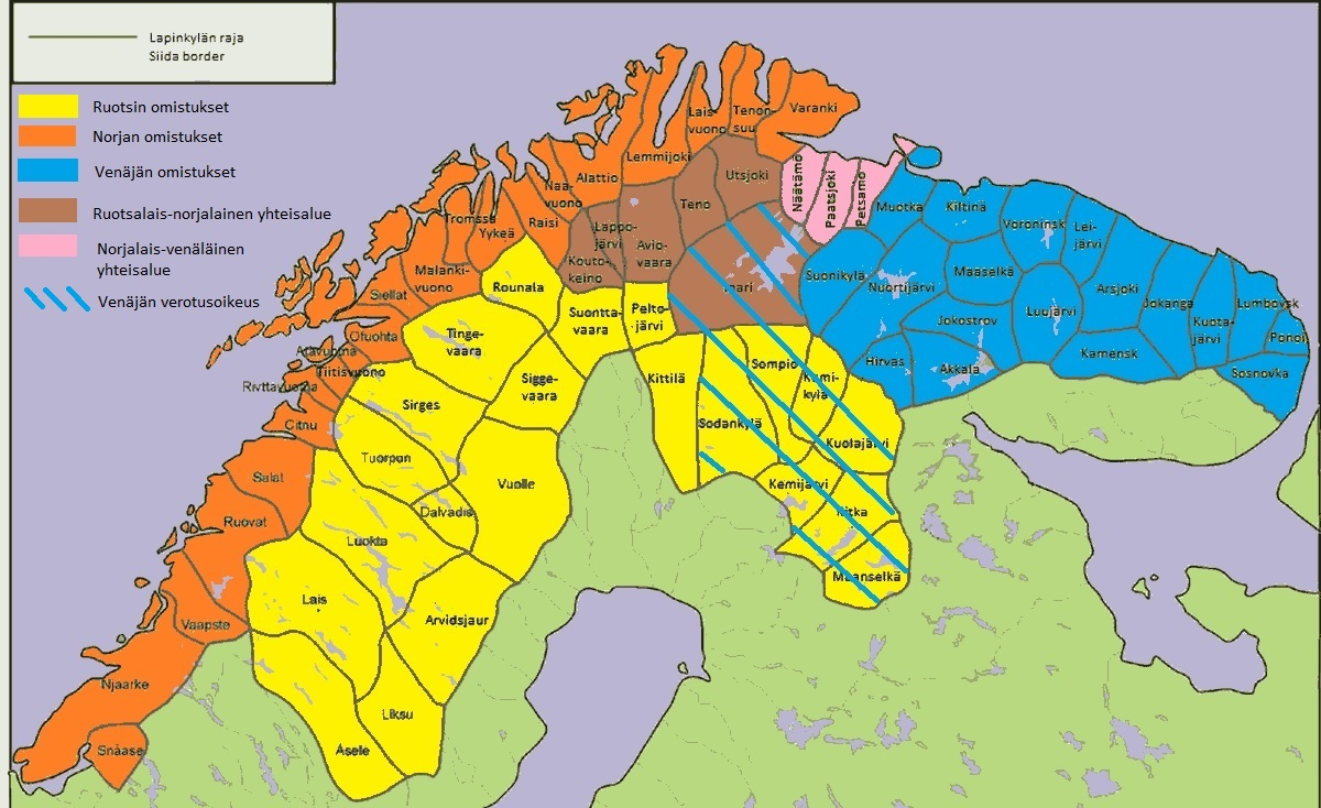 Ruotsin, Norjan ja Venäjän omistukset Lapissa 1613-1751.